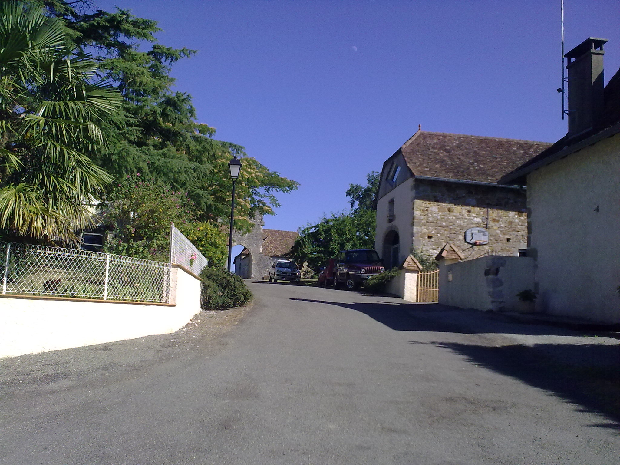 Castetbon le 18 juillet 2010, France.